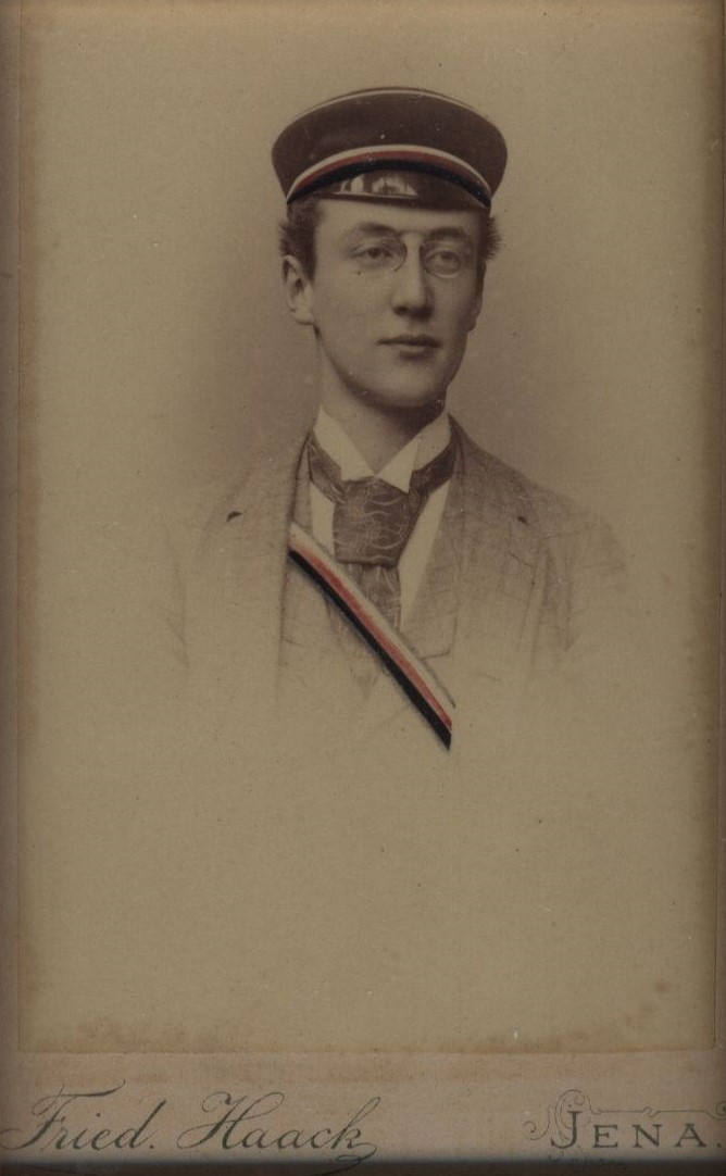 Porträtfotografie von Karl Grünberg als Jenenser Thüringer